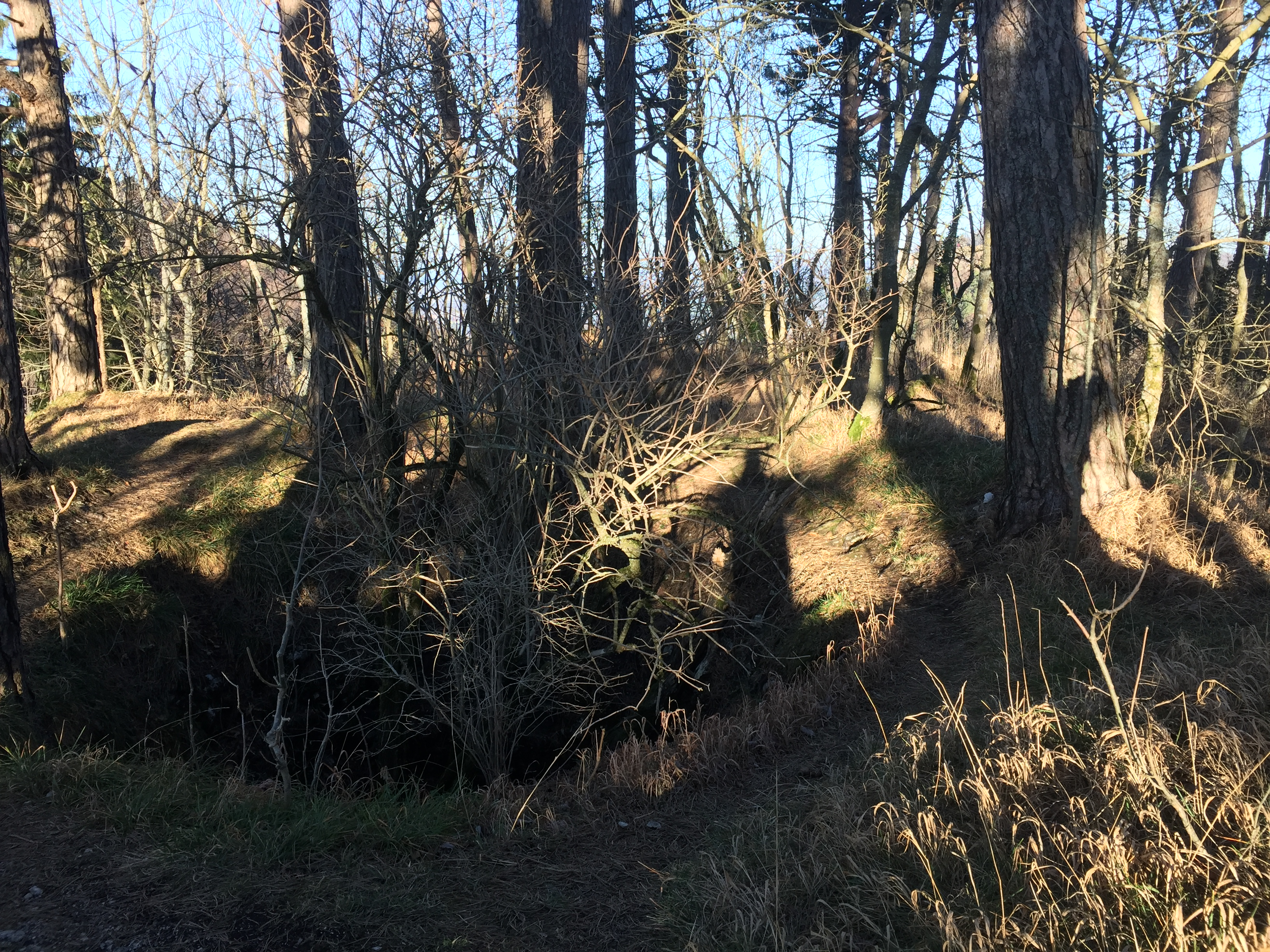 Wenzelstein